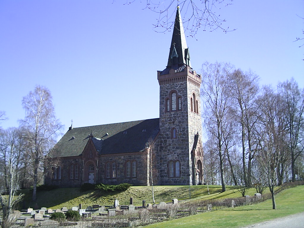 Gärdhems Kyrka. Fotograf:Tubaist Fotograferad april 2005.